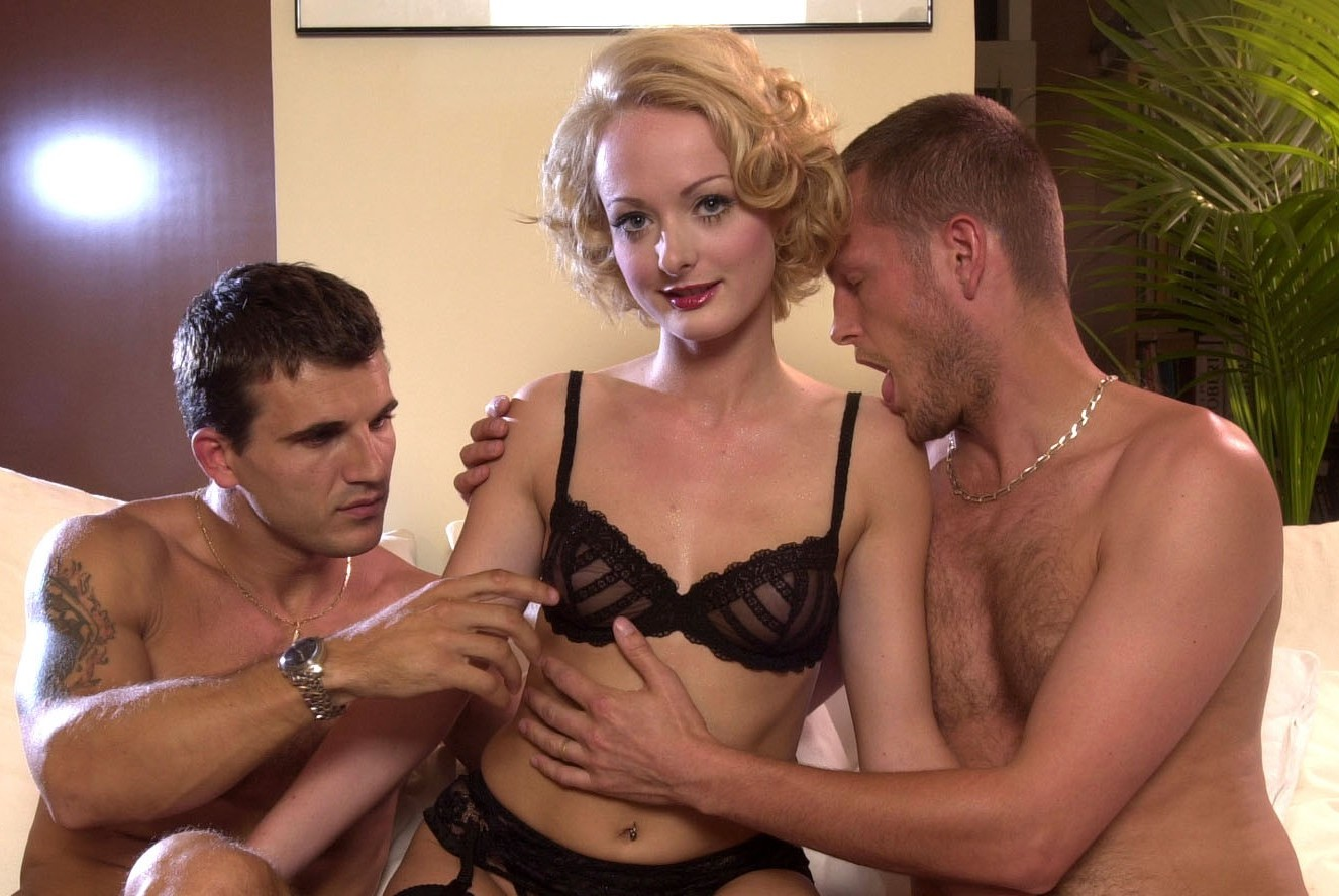 Sebastian Barrio, Melissa Lauren et Ian Scott sur le tournage d'une scène avec John B. Root